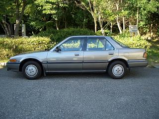 ２世代目 ビガー オートクルーズ付